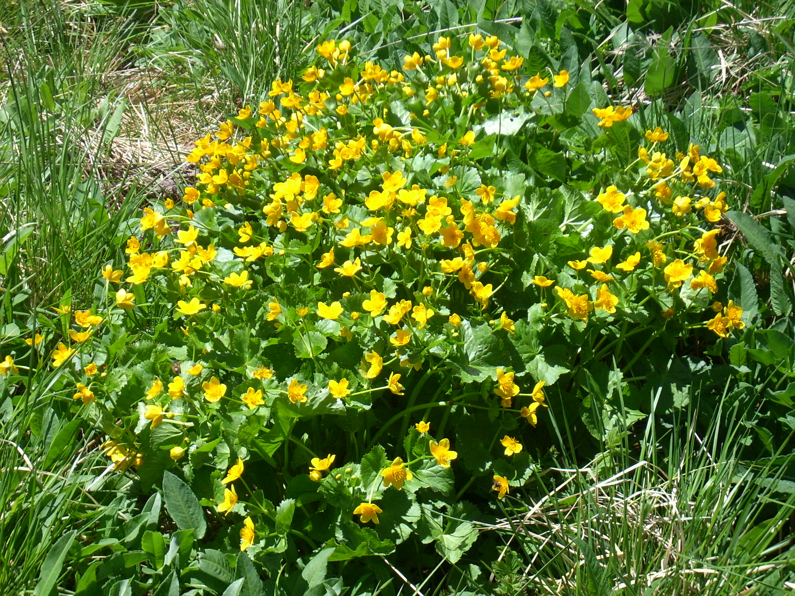 Fleurs sur le Vitocha (trolle d'Europe ?)